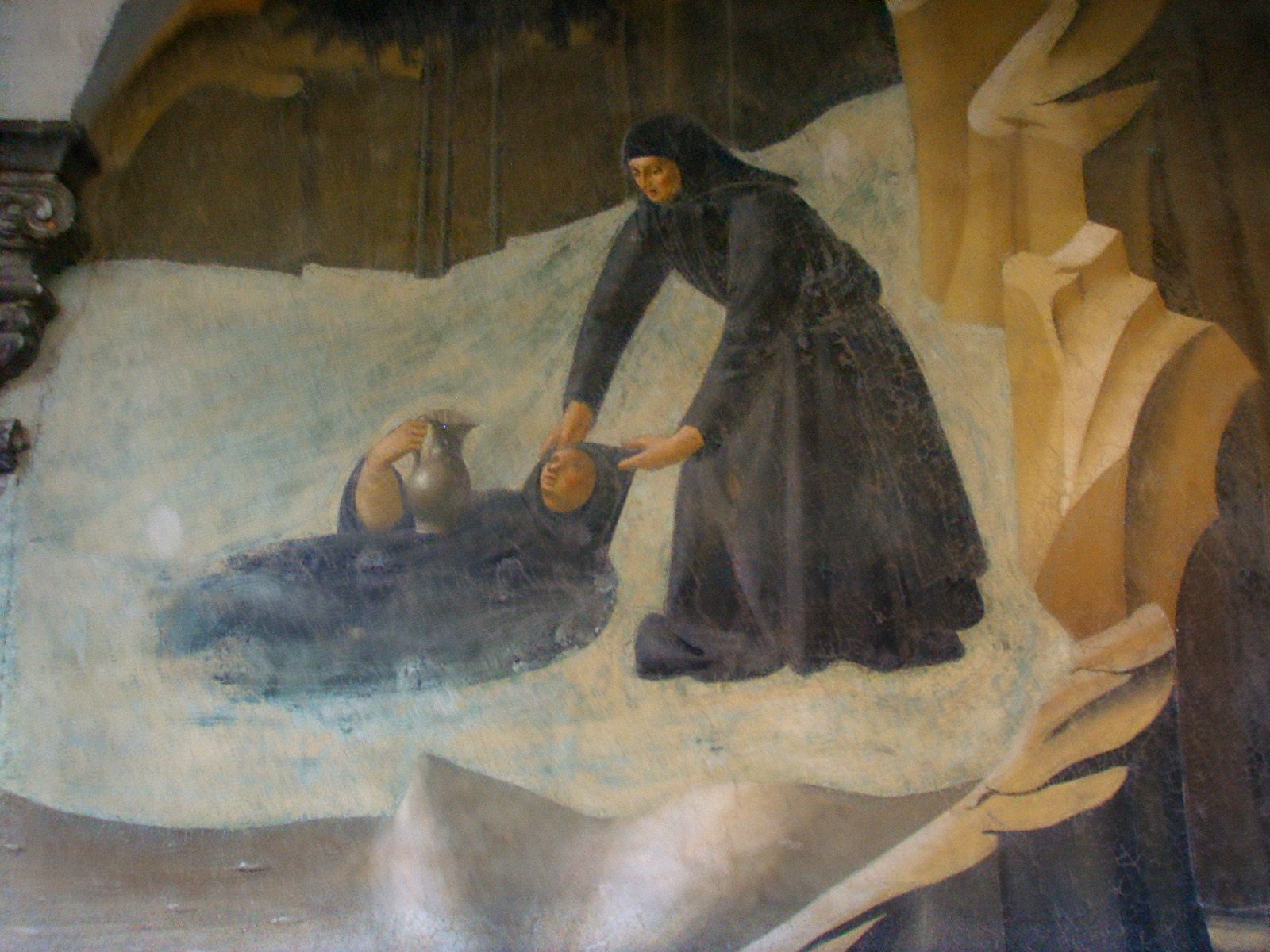 Badia_Fiorentina,_chiostro degli aranci, Storie di San Benedetto, XV century, by Giovanni da Consalvo, portuguese master